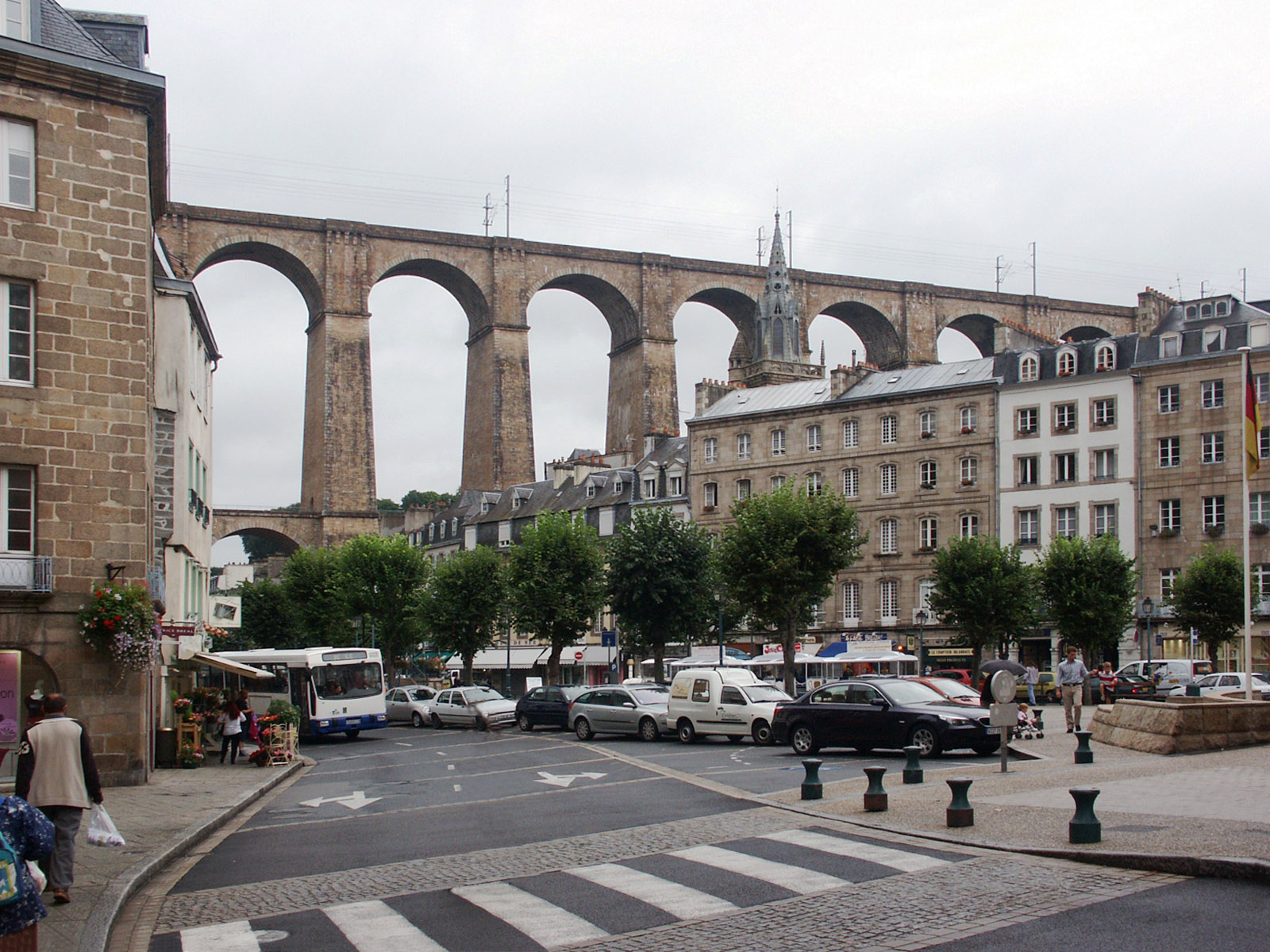 Morlaix (Finistère, Bretagne, France) : La Place des Otages et le Viaduc.